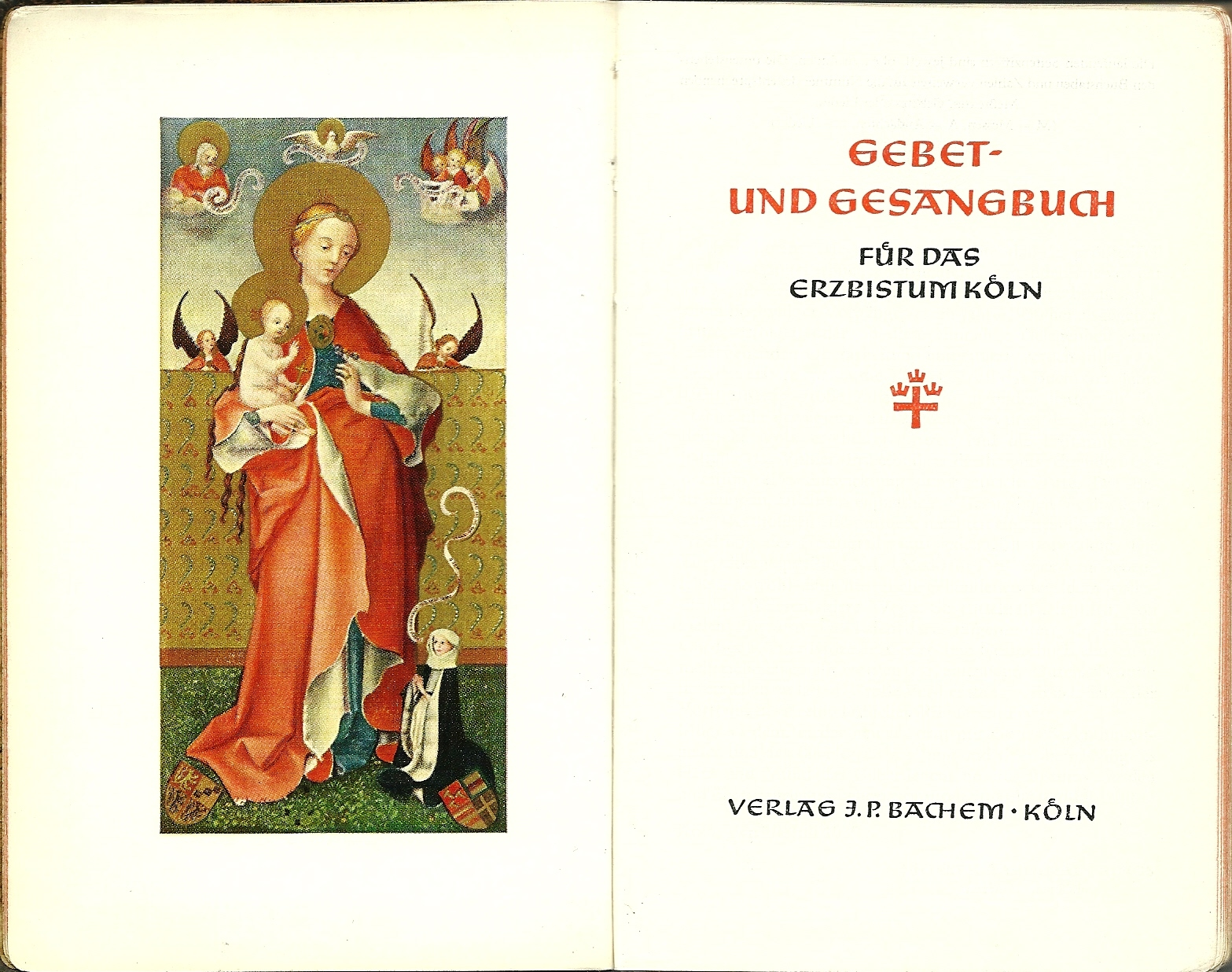 Gebet- und Gesangbuch für das Erzbistum Köln, J.P. Bachem Verlag GmbH, Köln, 1949 (Titelbild: Stephan Lochner, Madonna mit dem Veilchen (1440))